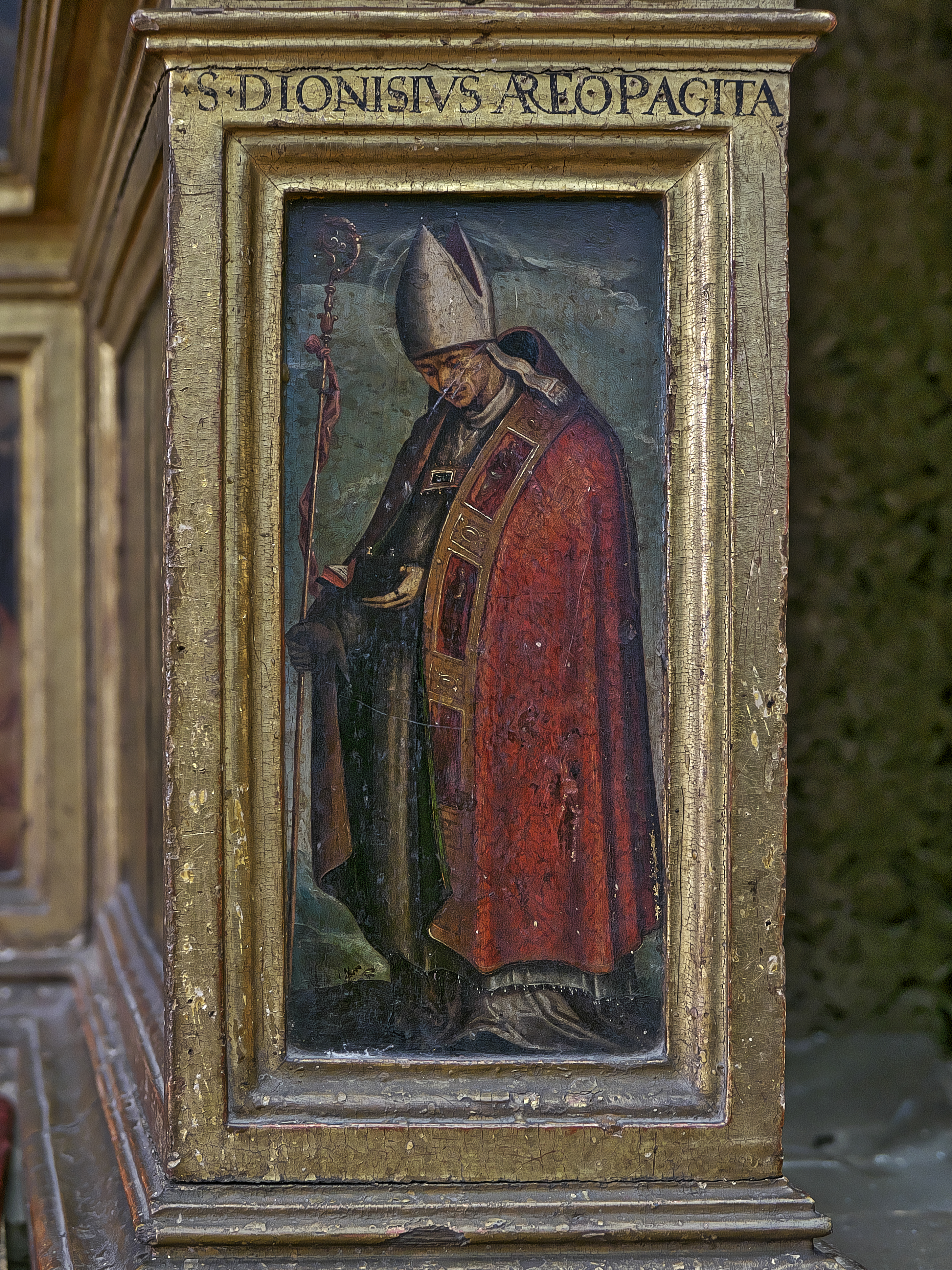 Retablo de la Virgen de Belén. Pintura manierista al óleo sobre tabla (h. 1588), atribuida a Vasco Pereira.